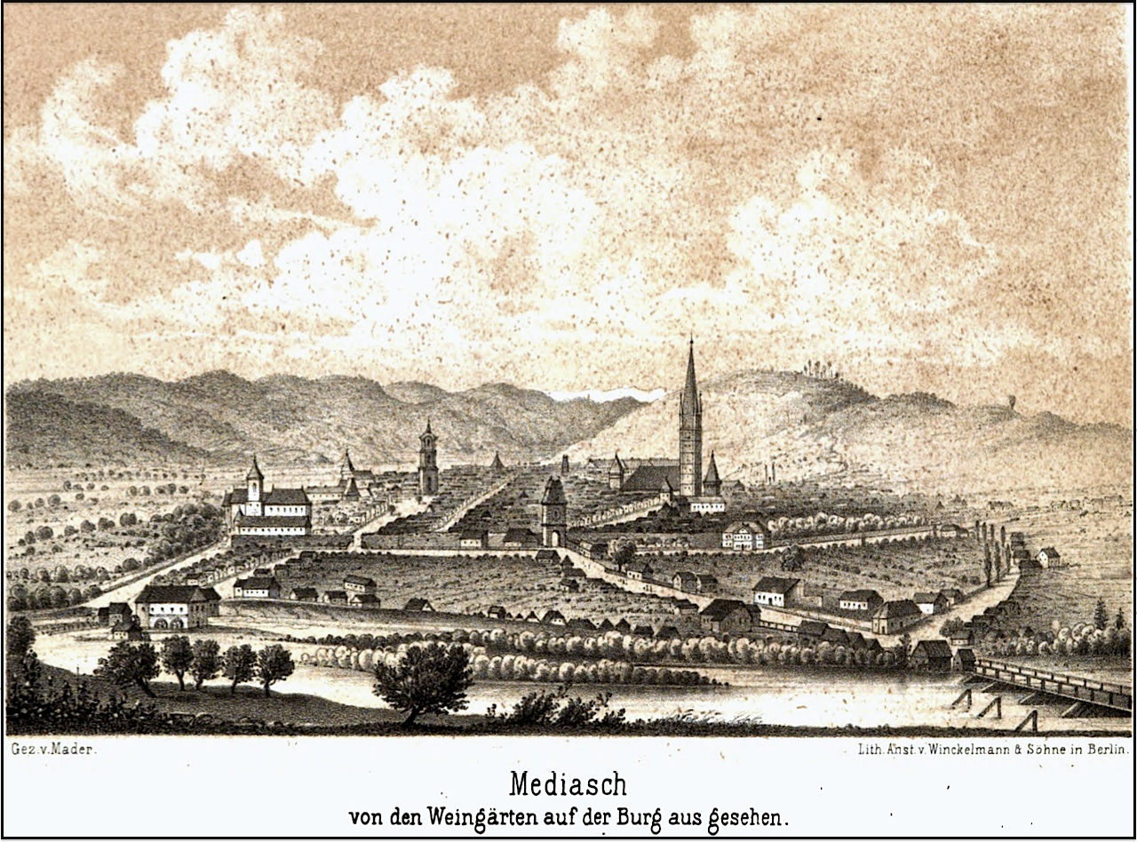 Mediasch auf einer Ansicht von 1862